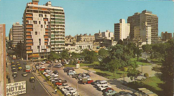 Vista aérea de la Plaza Sarmiento de Rosario (Argentina) y el Hotel Europeo.